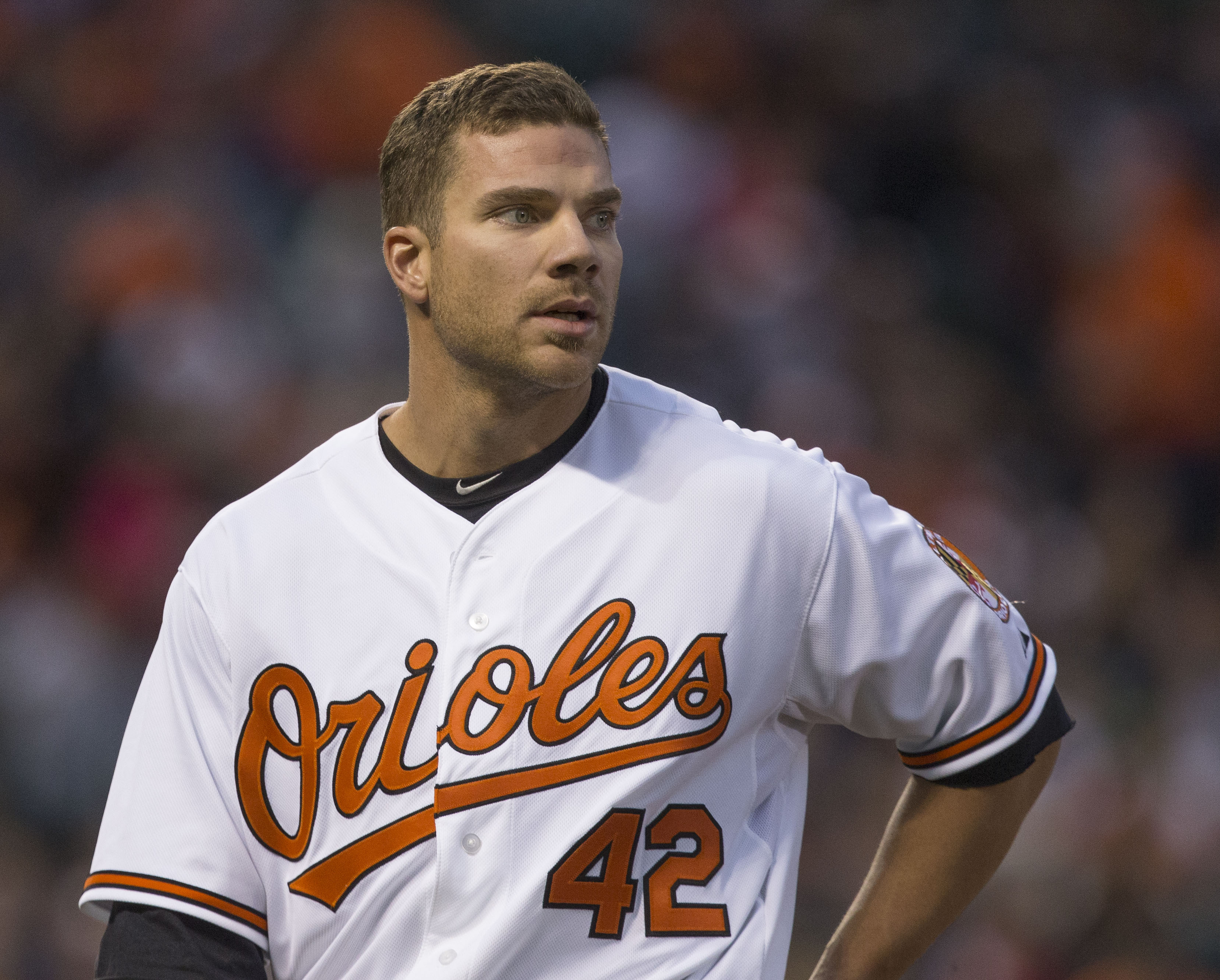 Yankees at Orioles 04/15/15